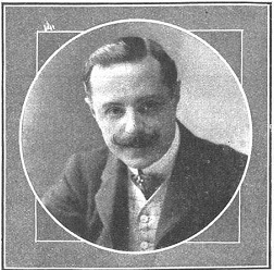 Retrato del escritor y periodista Luis de Tapia, obra de Compañy, recogido en la revista española Mundo Gráfico.